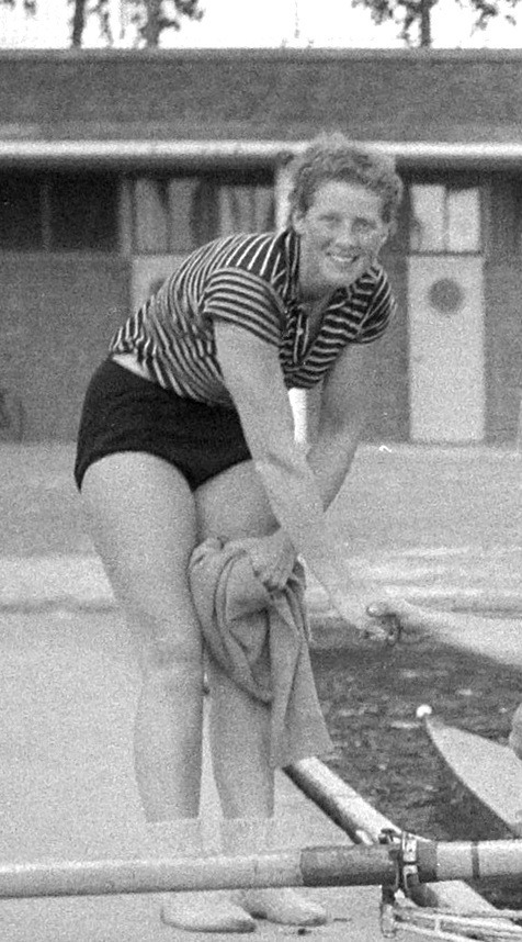 Training roeien op de Bosbaan, hier de Engelse Penny Chuter die kennis maakt met de oude vier van Nereus